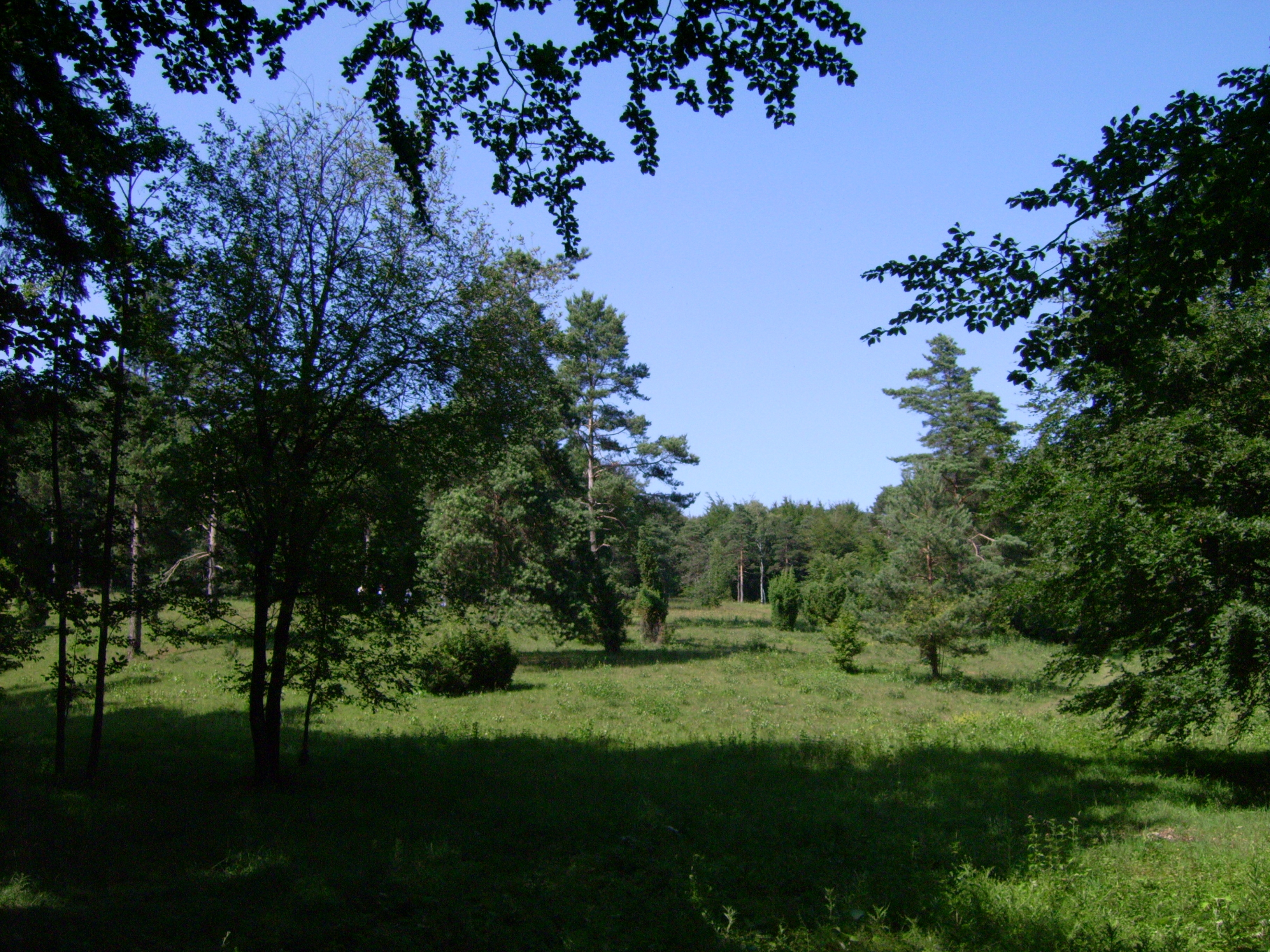 NSG Silberberg in Hagen am Teutoburger Wald, Parklandschaft